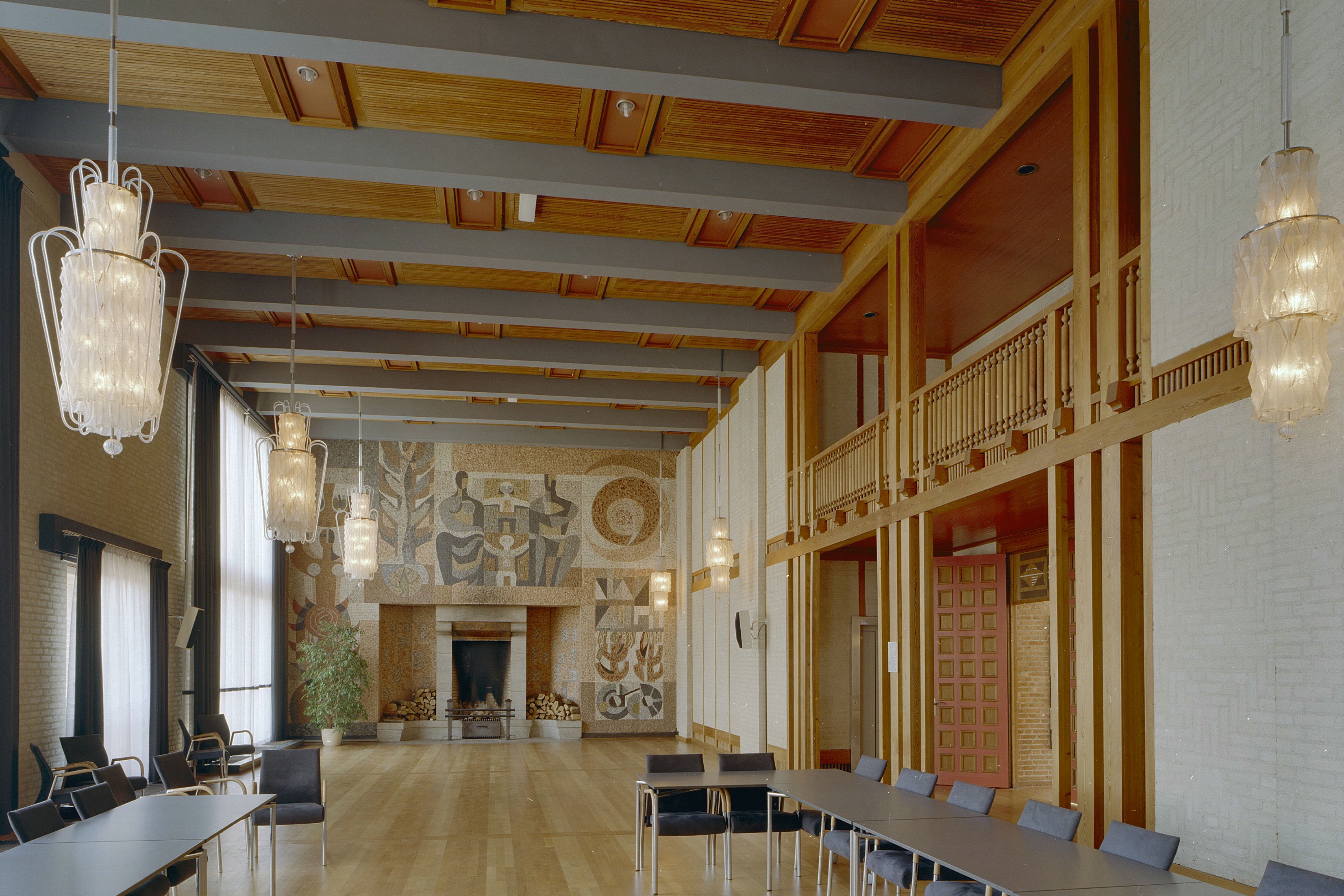 Stadhuis: Interieur burgerzaal met mozaiëkwand (opmerking: Gefotografeerd voor Toonbeelden van de Wederopbouw)